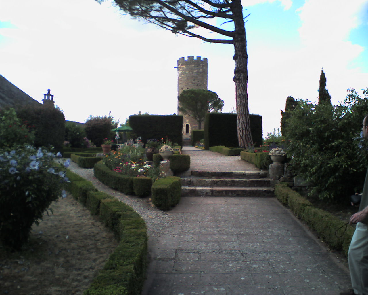 Donjon de turenne en correze